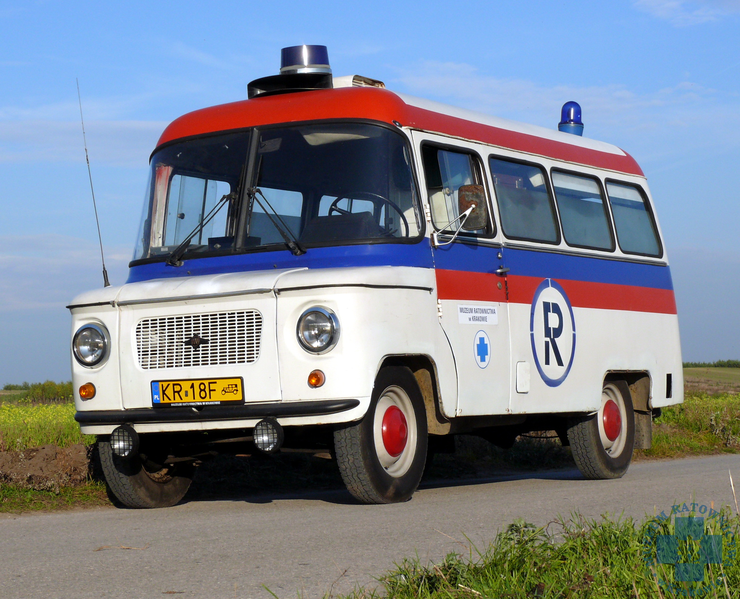 pogotowie, ambulans, Muzeum Ratownictwa w Krakowie, nysa 522, sanitarka